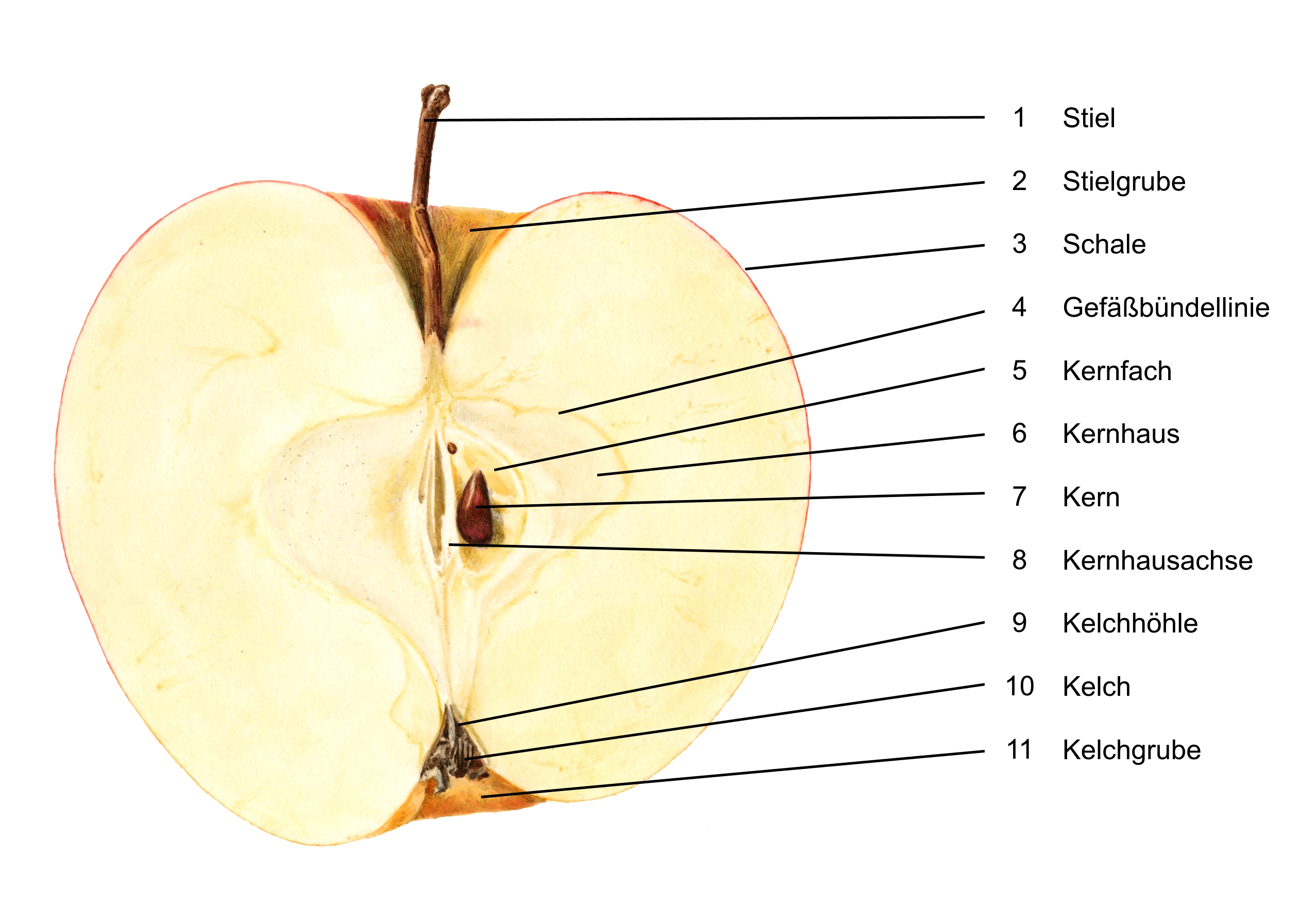 Bildinhalt: Längsschnitt durch einen Apfel mit Nummerierung und Beschriftung einzelner Bestandteile